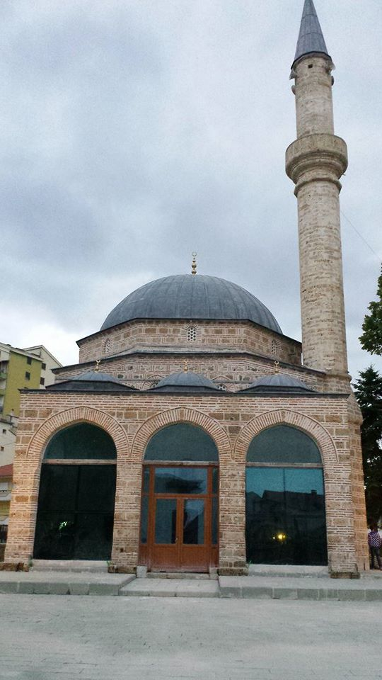 Xhamia e Iljaz Mihrahorit